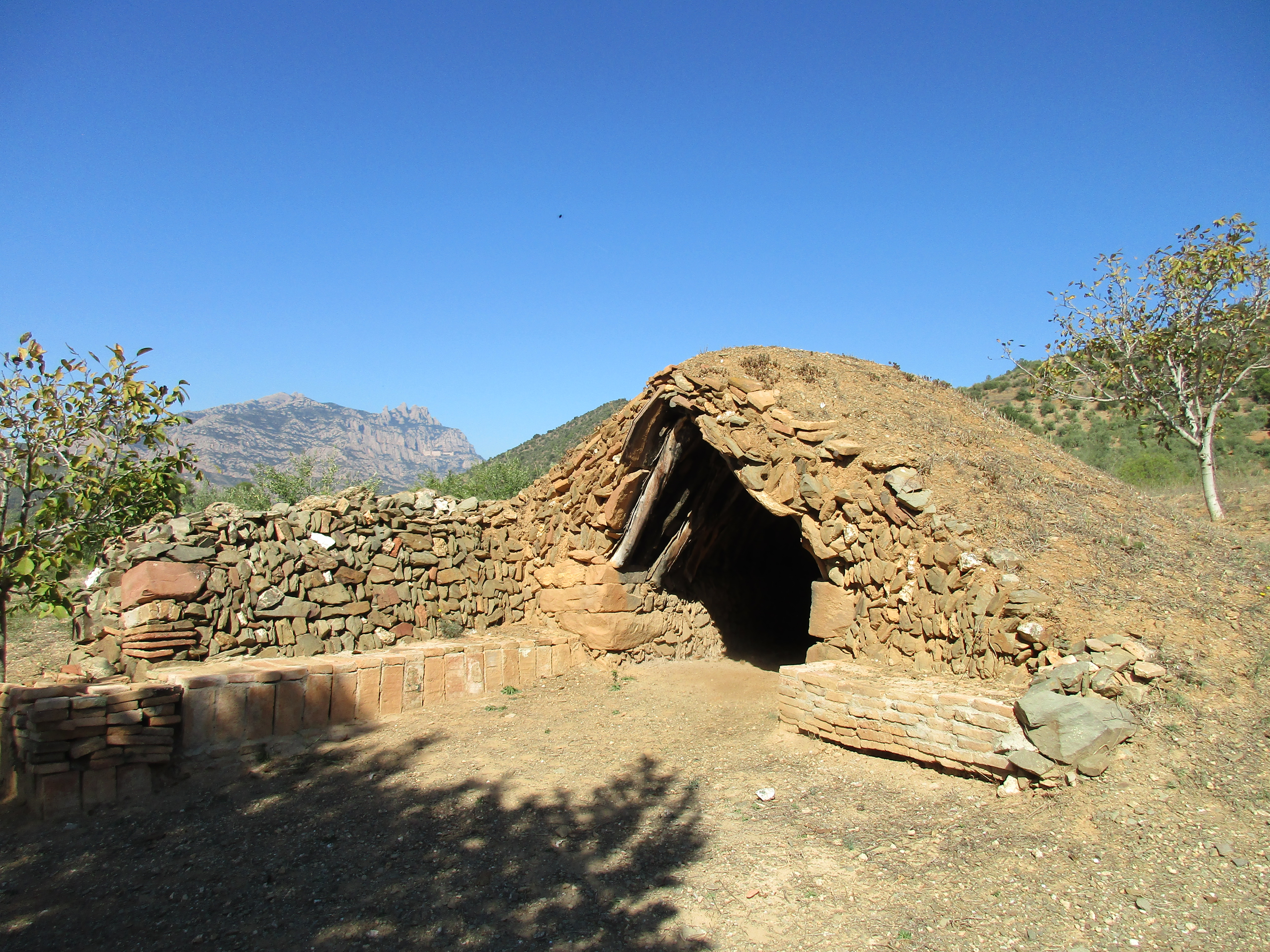 Barraca olesana de pedra seca